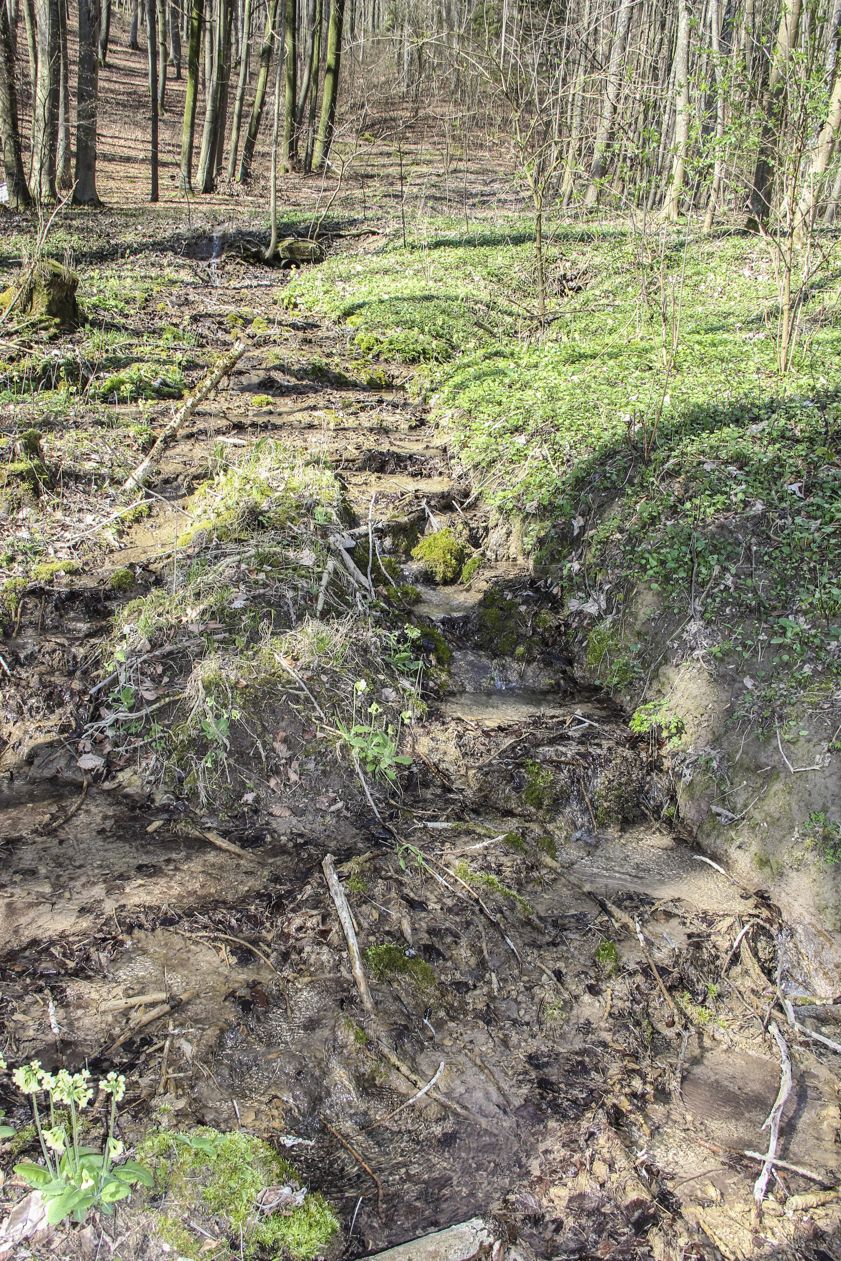 Bachlauf, Sinterbecken, Wolfsbronn, Meinheim